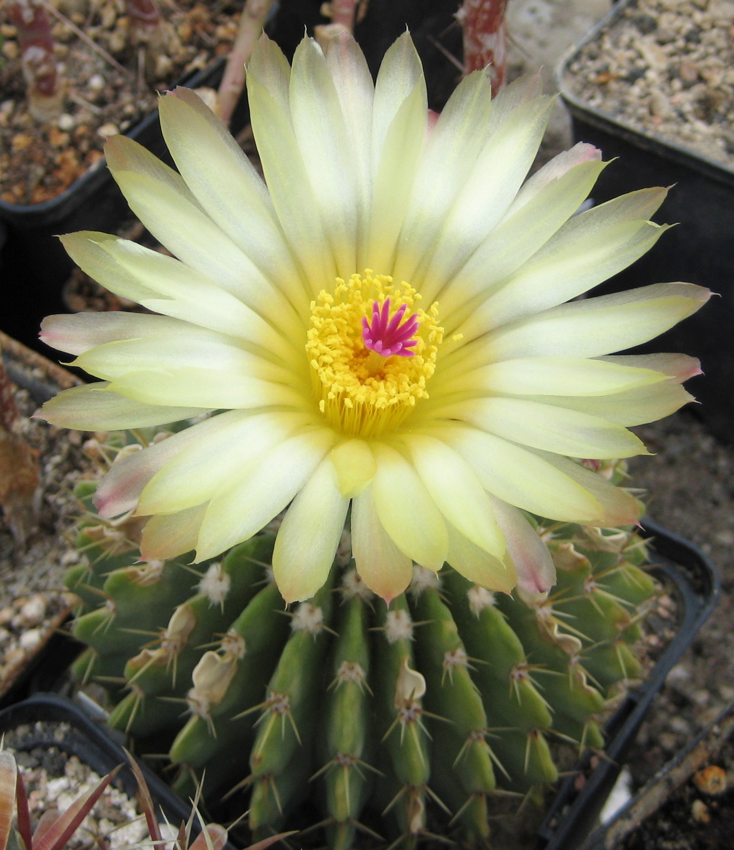 Parodia buiningii in Kultur